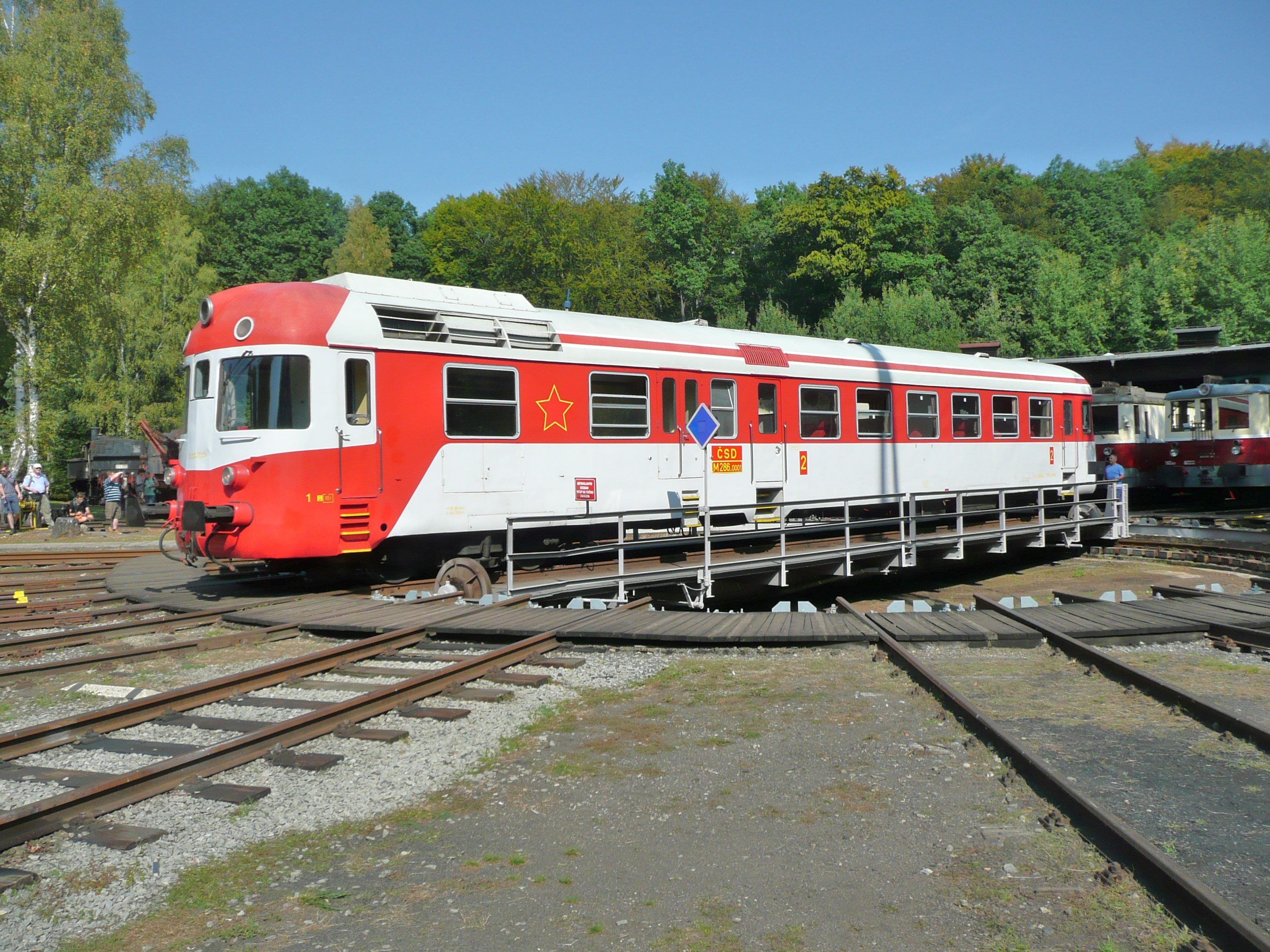 M 286 0001 Vorderansicht